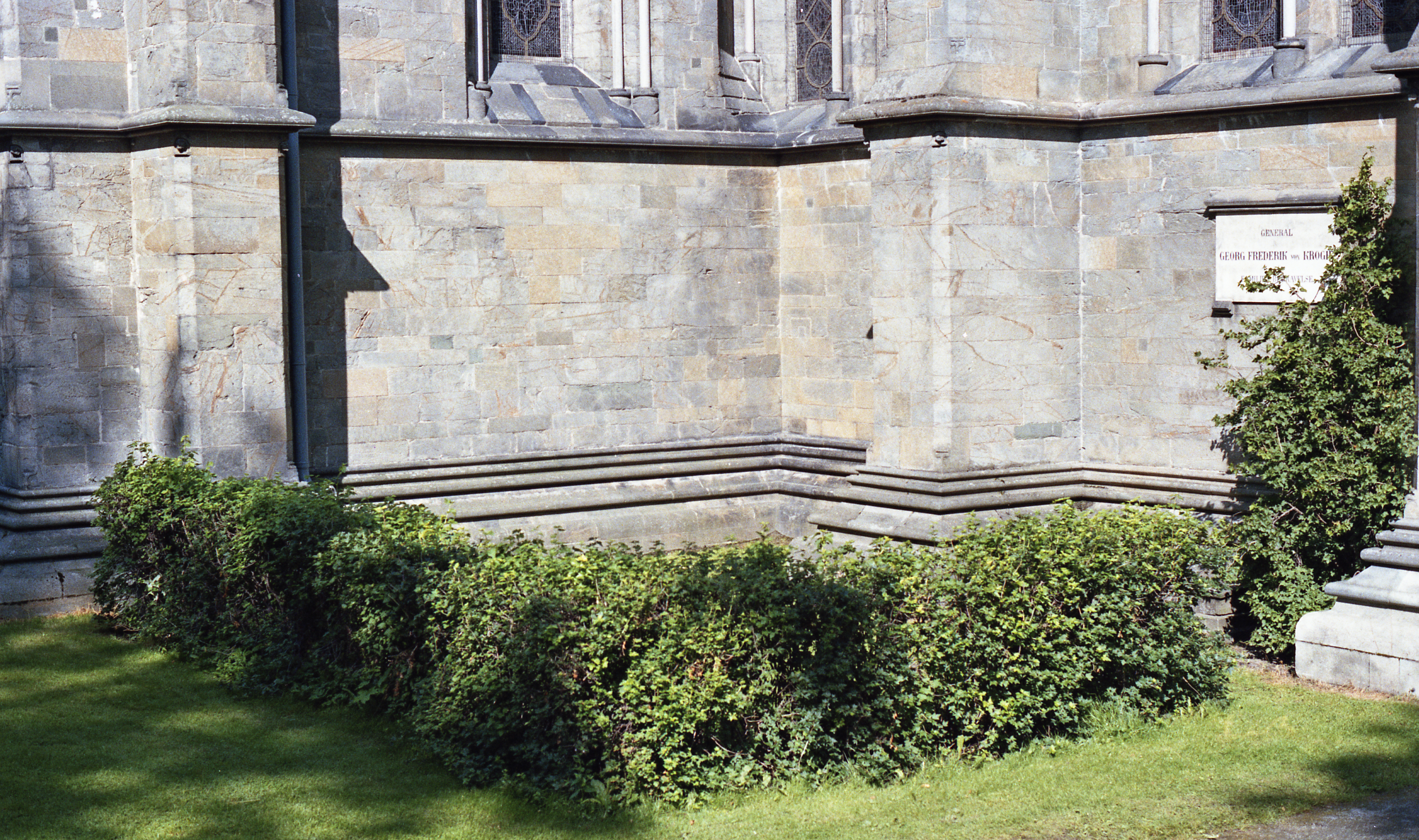 Format: Negativ 35 mm film Film: Fuji HR 100 Dato / Date: ca. 1990 Fotograf / Photographer: Byantikvaren Sted / Place: Domkirkegården, Trondheim Wikipedia: Georg Frederik von Krogh (1732 - 1819) DIS-Norge: Gravminner i Norge Eier / Owner Institution: Trondheim byarkiv, The Municipal Archives of Trondheim Arkivreferanse / Archive reference: Tor.H43.B76.F18637 [Film 02] General Georg Frederik von Krogh's Familie-Begravelse